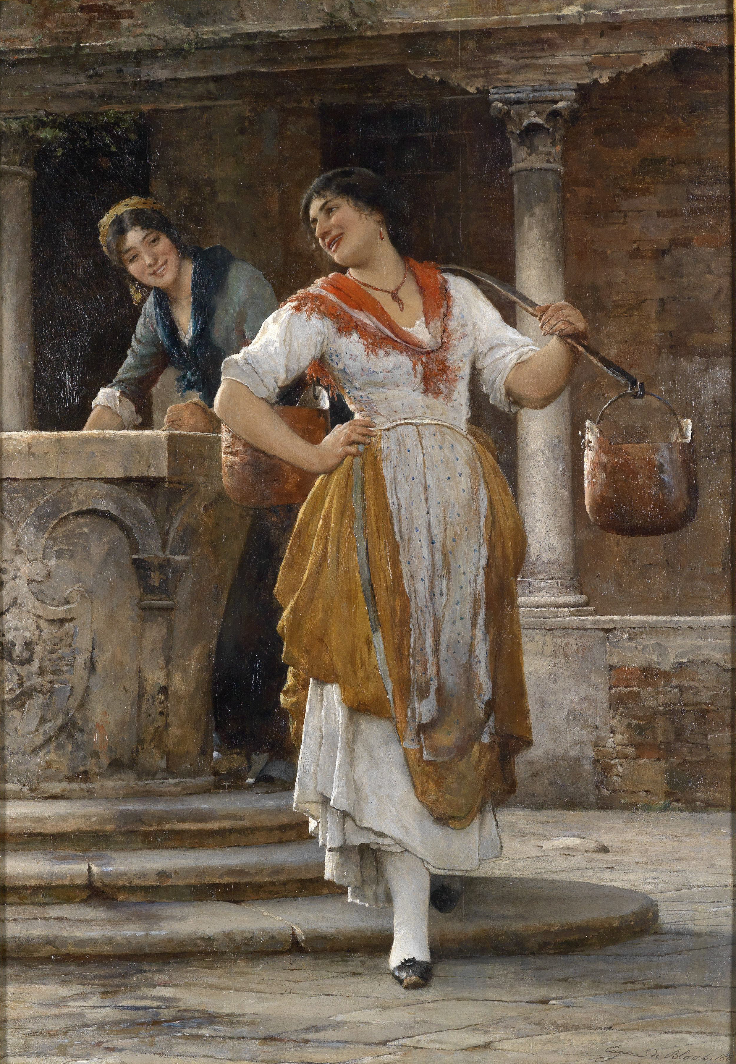 Die Wasserträgerin, signiert, datiert Eugene De Blaas 188(7), Öl auf Holz auf Holz, 67,3 x 47,6 cm